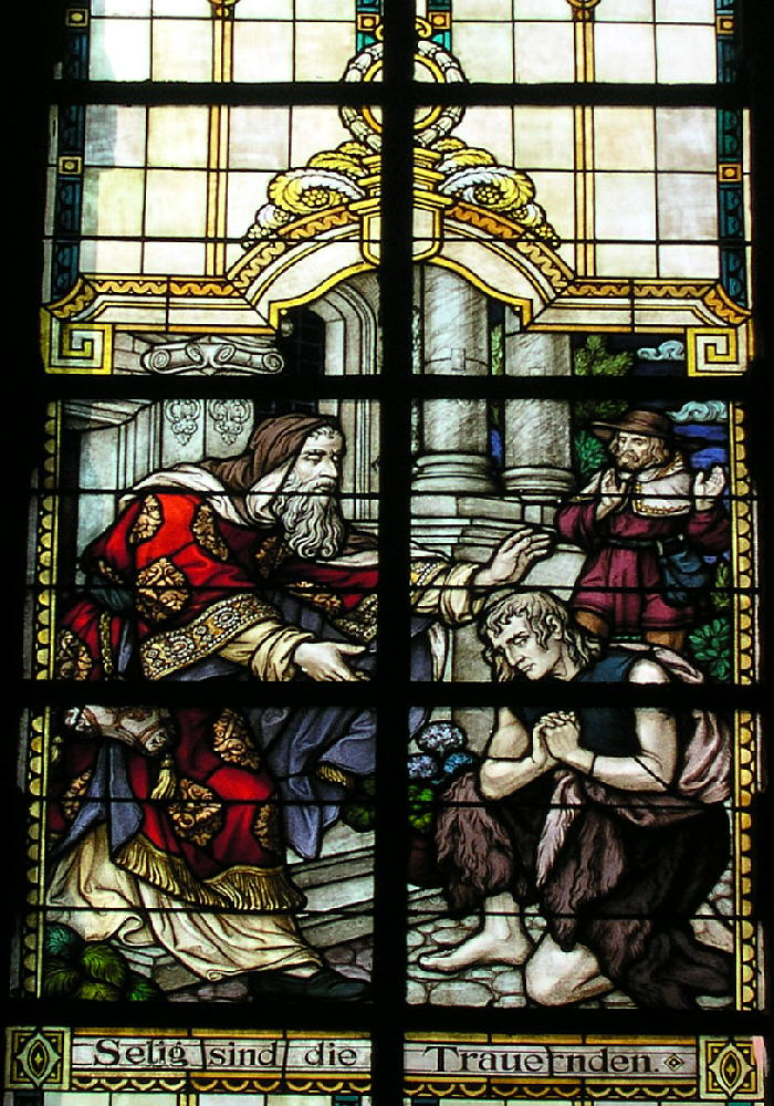 Trittenheim an der Mosel, Bleiglasfenster im Nazarenerstil (1923) in der katholischen Pfarrkirche "St. Clemens" Matthäus 5,4 Selig die Trauernden; denn sie werden getröstet werden. Aus den Jahren 1920/21 stammen die größtenteils noch originalen neoromanisch gehaltenen Glasfenster der Firmen Gassen & Blaschke (Düsseldorf; 1., 2., 4. und 6. Seligpreisung)